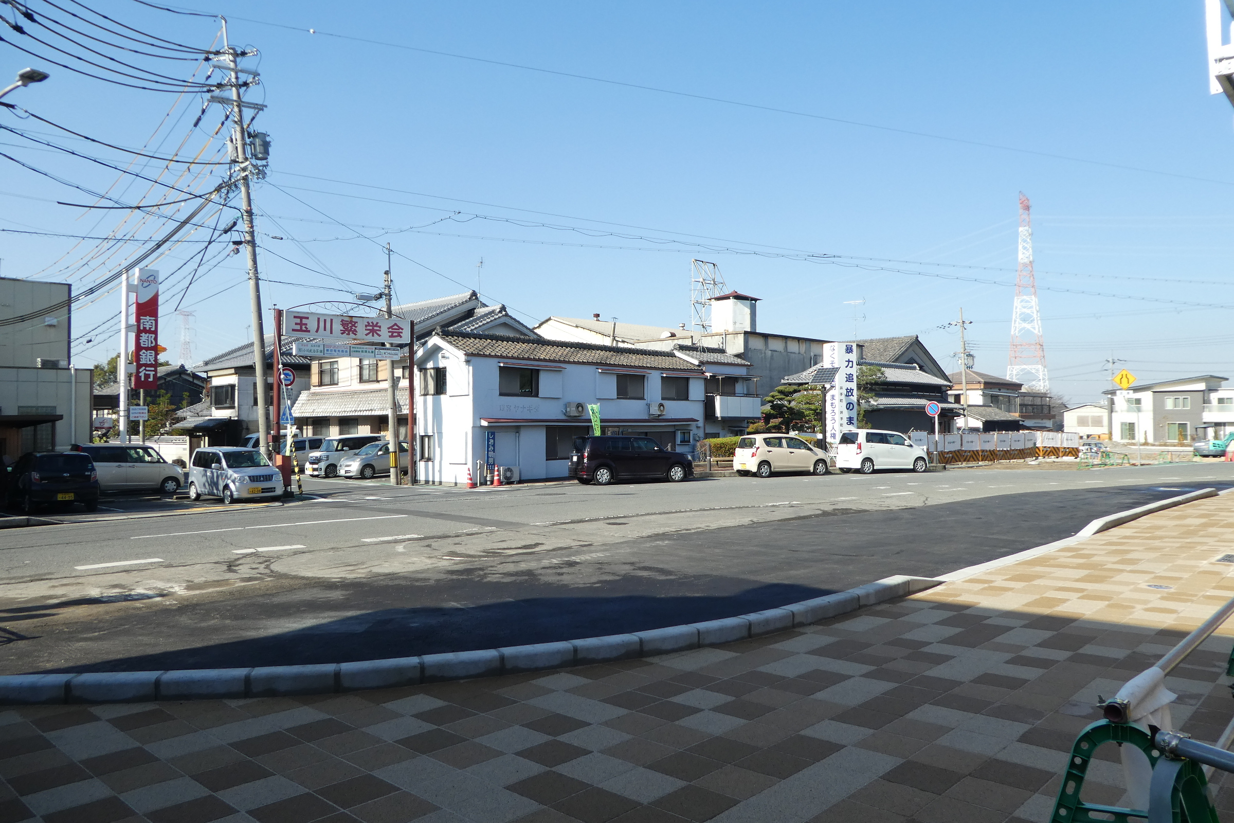 奈良線玉水駅前広場